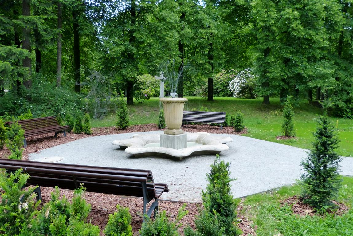 Am Standort des entstehenden Lapidariums auf dem Georgenberg in Spremberg.